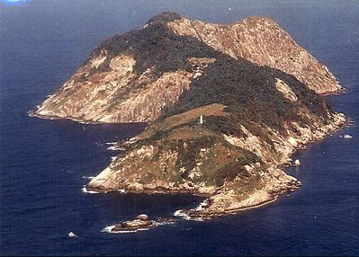 Ilha da Queimada Grande - Itanhaém2 This photo was invited and added to the Biomas do Brasil group.